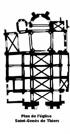 Plan de l'église Saint-Genès de Thiers